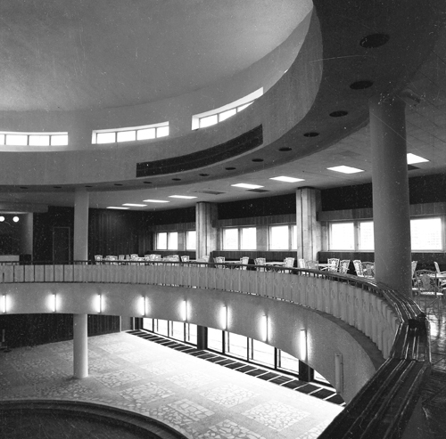 Интерьер ДК в Новополотске был реализован по проекту Карако В.